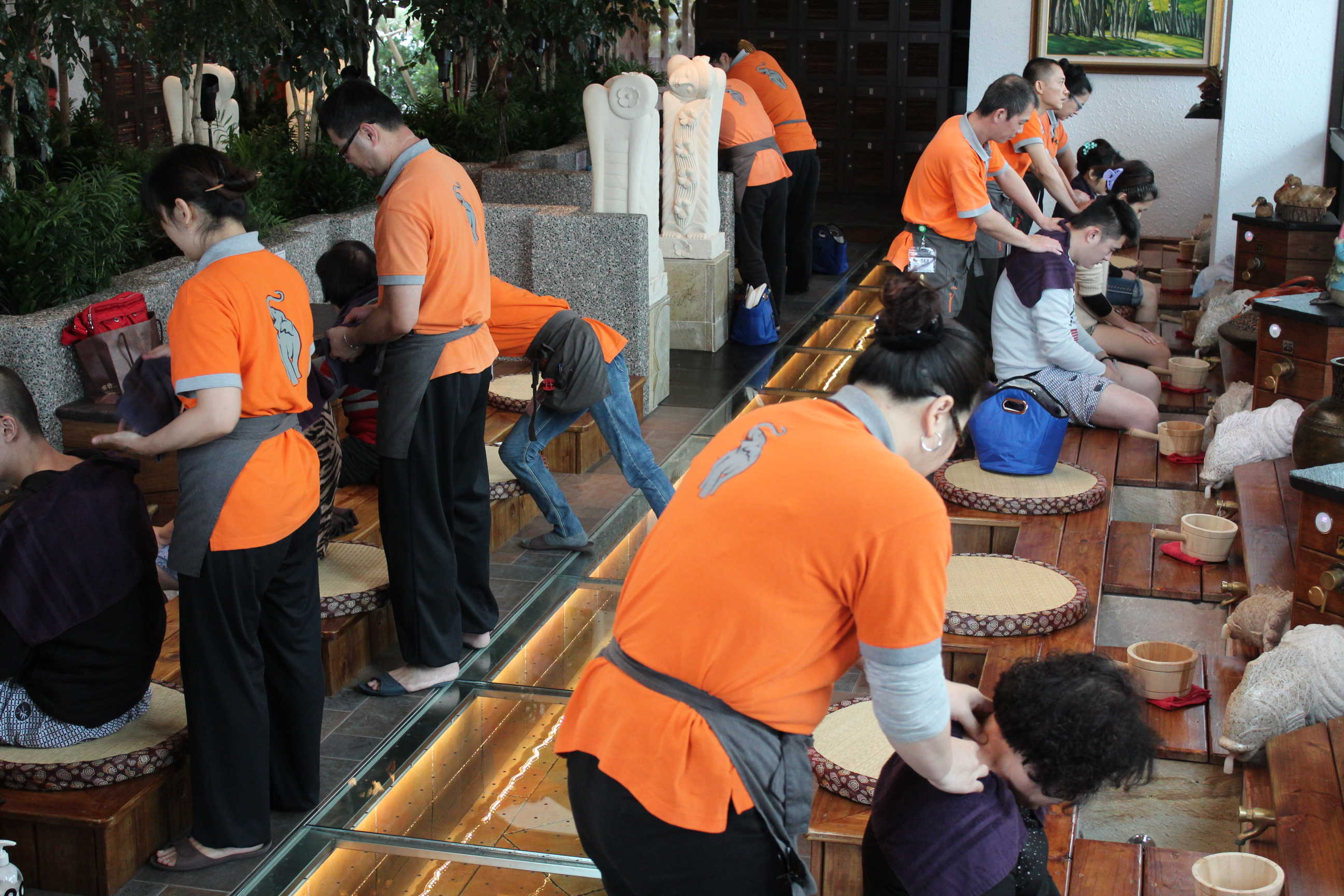 您知道長期的疲勞累積會讓您的表現每況愈下嗎? 身體跟地球一樣都只有一個 我們必須愛惜我們的身體 木野養生會館懂您的辛勞,多久沒有放鬆了呢? 歡迎來電預約: 04-24225565